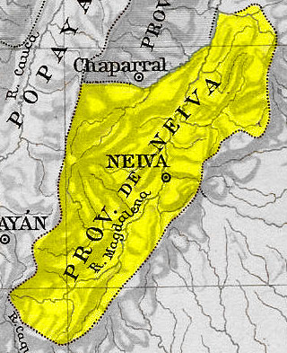 Mapa de la Provincia de Neiva en 1810 y 1830